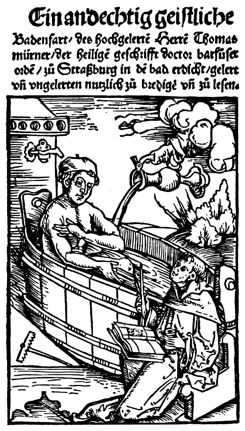 Titelblatt des Buchs «Eine andechtig geistliche Badenfahrt» von Thomas Murner.